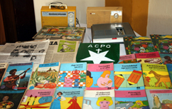 Medios escritos